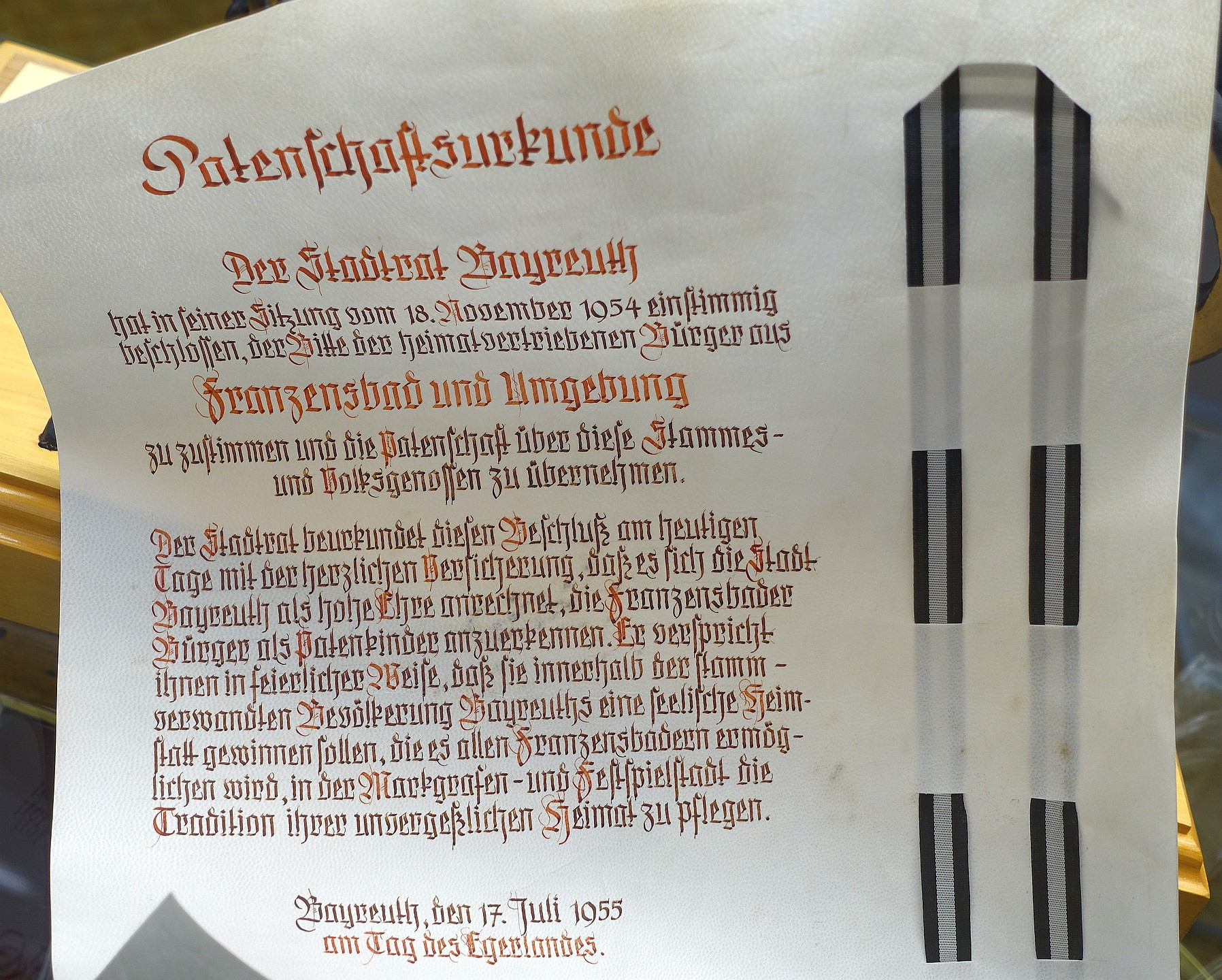 Patenschaftsurkunde der Stadt Bayreuth aus dem Jahr 1955 für die Heimatvertriebenen aus Franzensbad (Františkovy Lázně) mit Gebrauch der Bezeichnung "Volksgenossen".